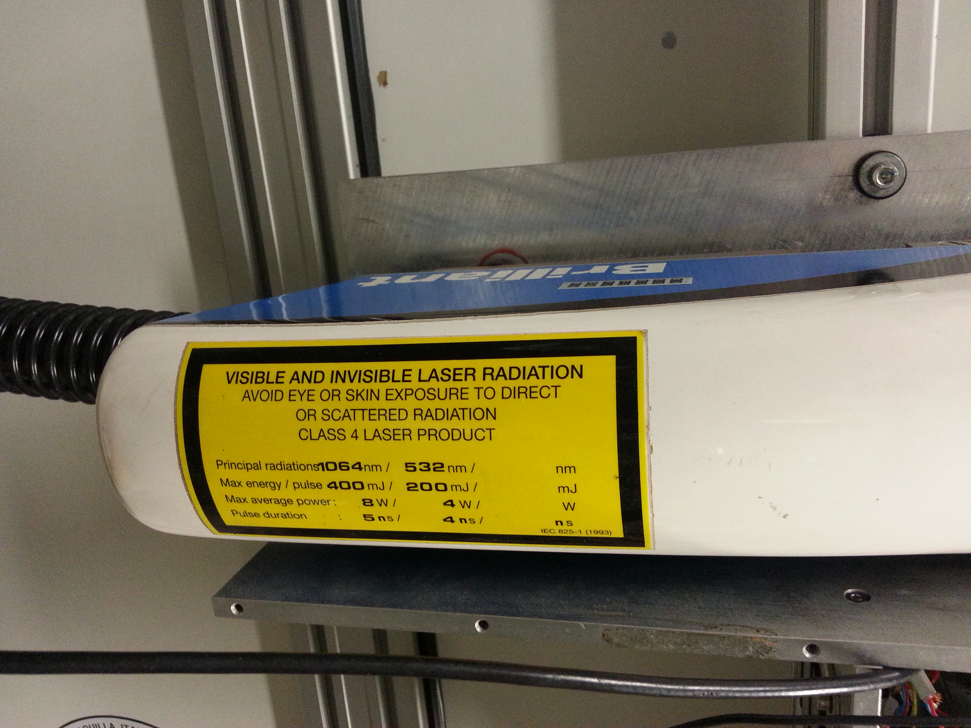 meteo laser tag